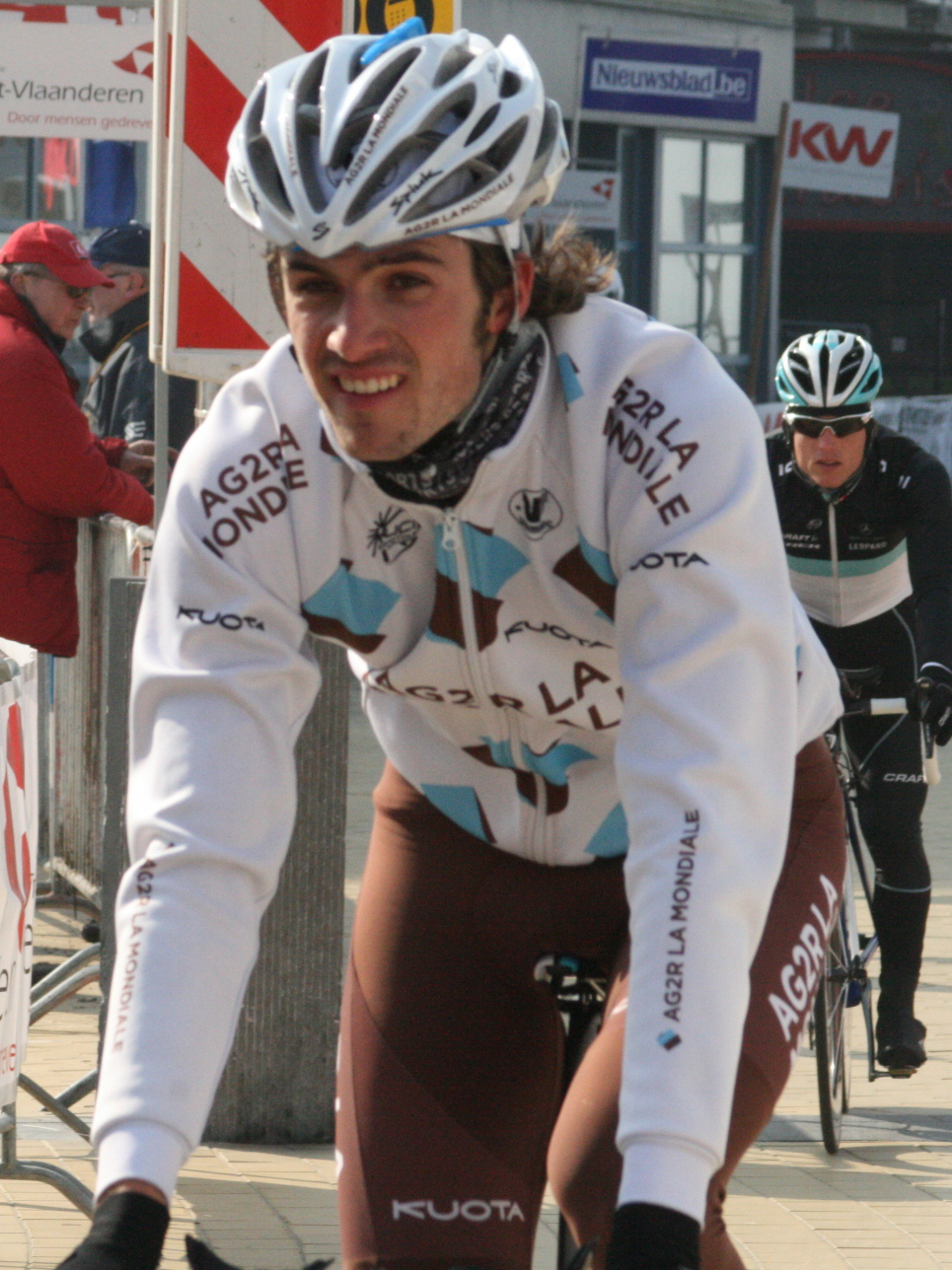 Driedaagse van West-Vlaanderen 2011, proloog in Middelkerke